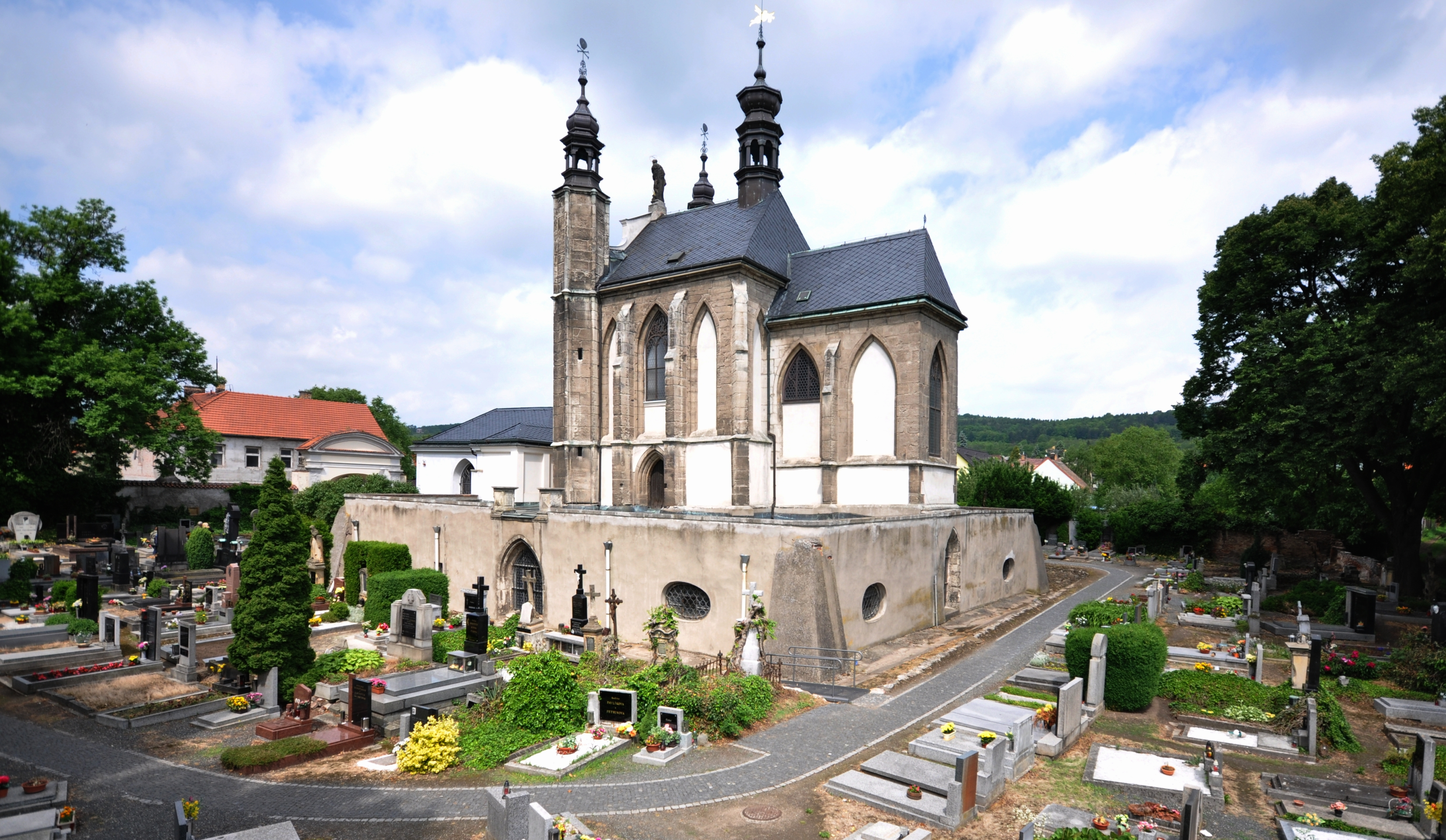 Sedlec u Kutné Hory, pohled na karner od jihovýchodu. Hřbitovní kaple Všech svatých s kostnicí, Sedlec, Sedlec (Kutná Hora).